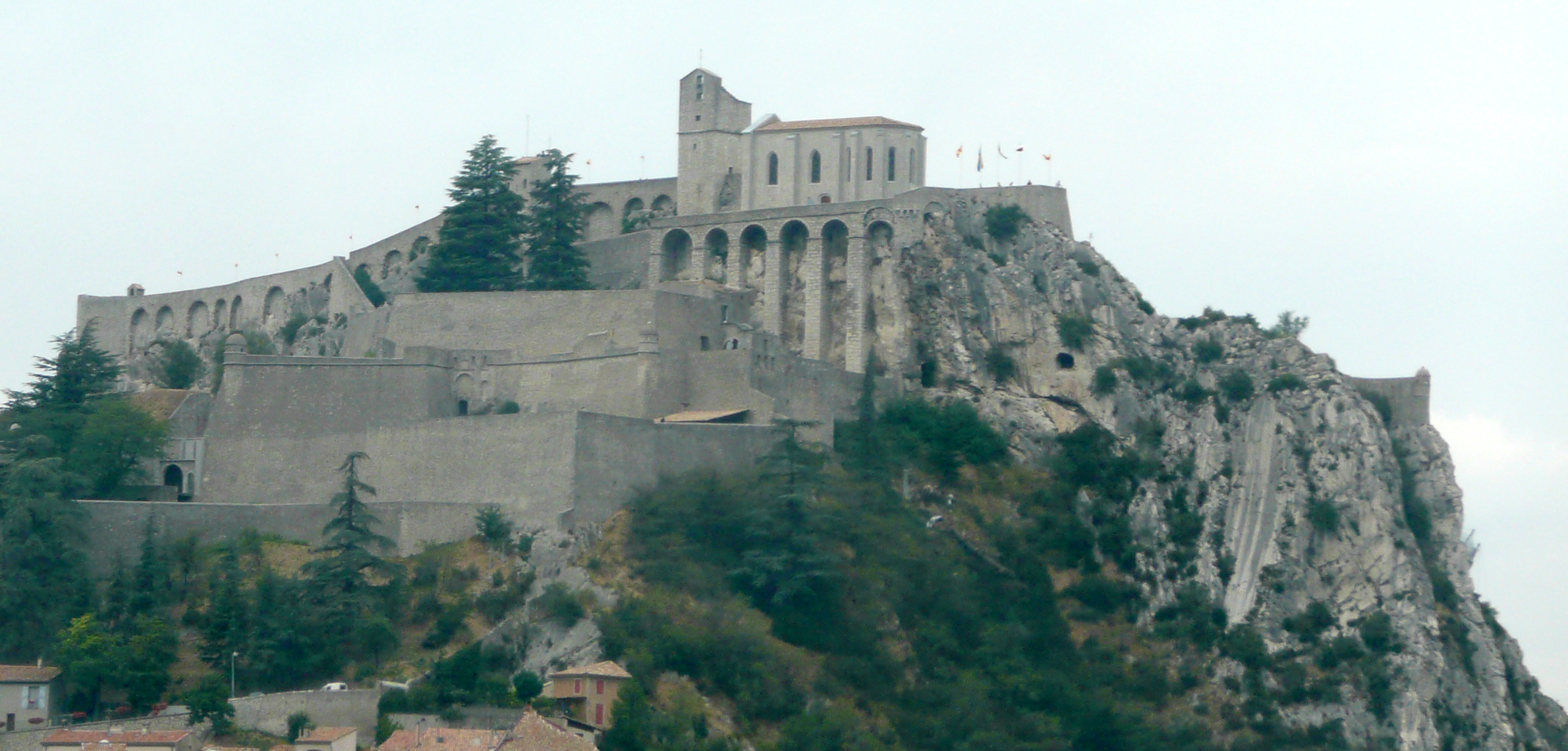 Citadelle de Sisteron